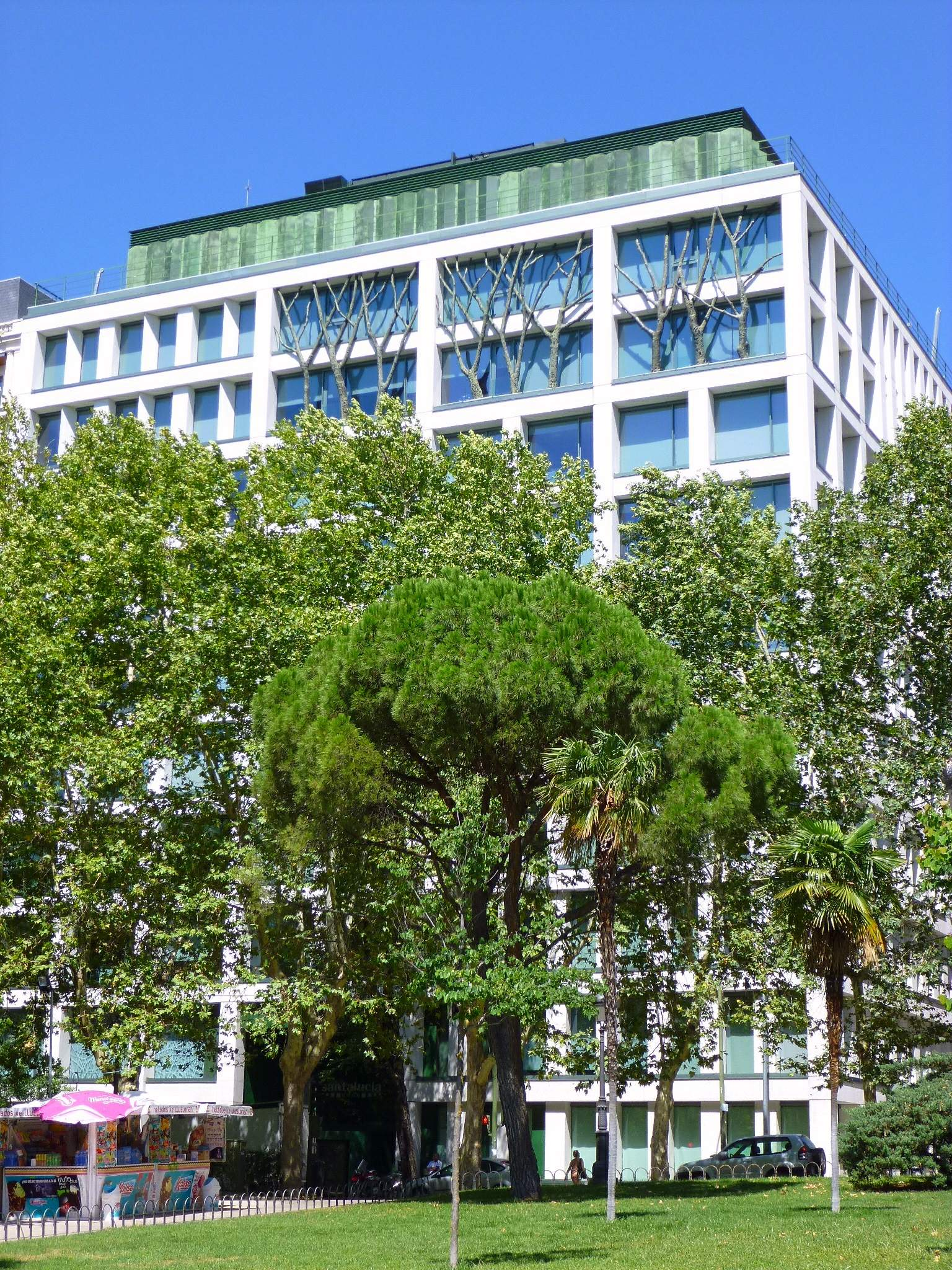 Edificio de ampliación de la sede de Seguros Santa Lucía, en Madrid